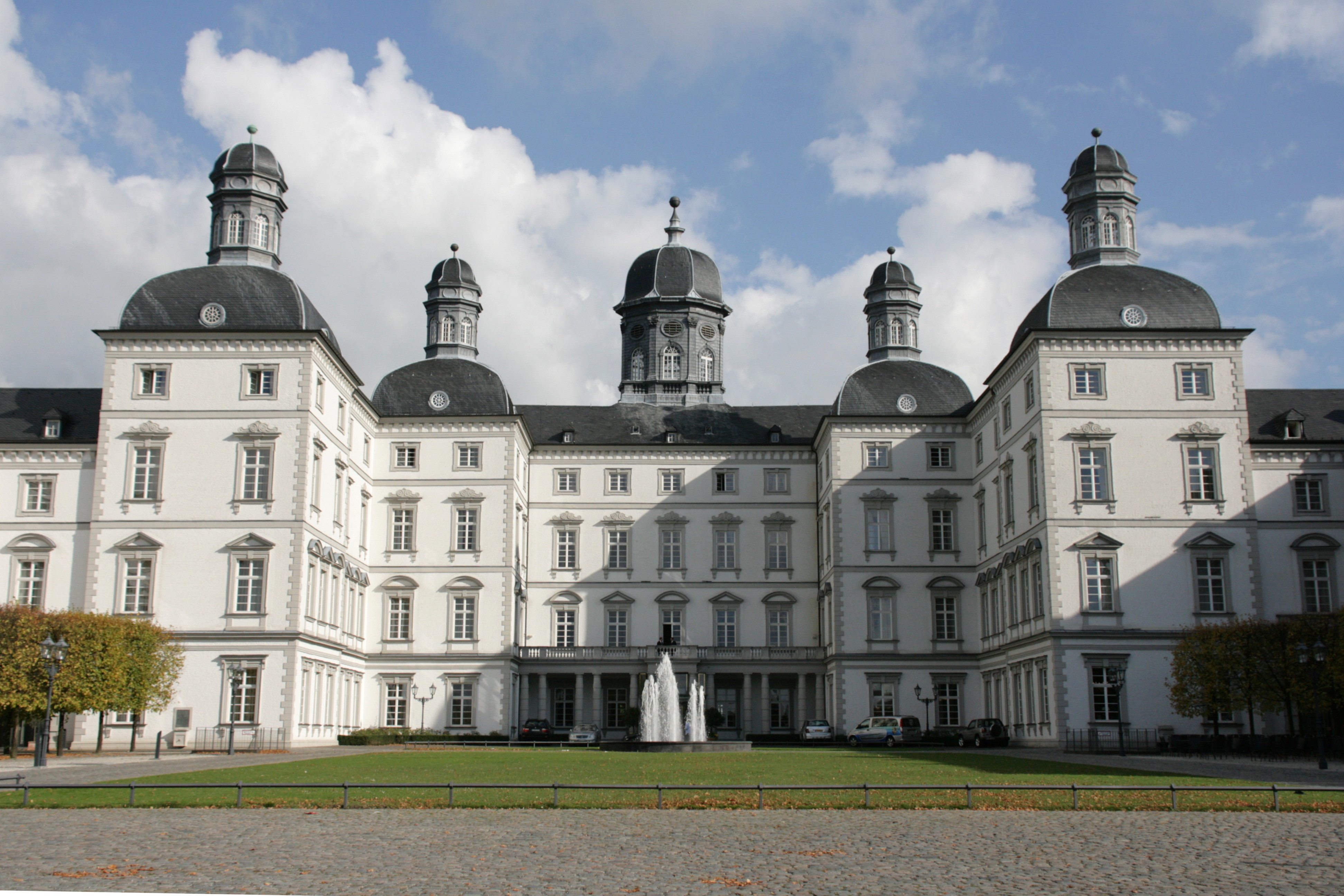 Schloss Bensberg, Kadettenstraße 1 in Bergisch Gladbach